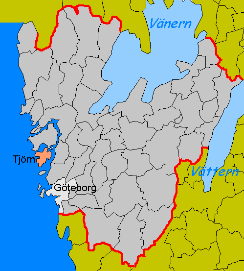 date aug. 2005